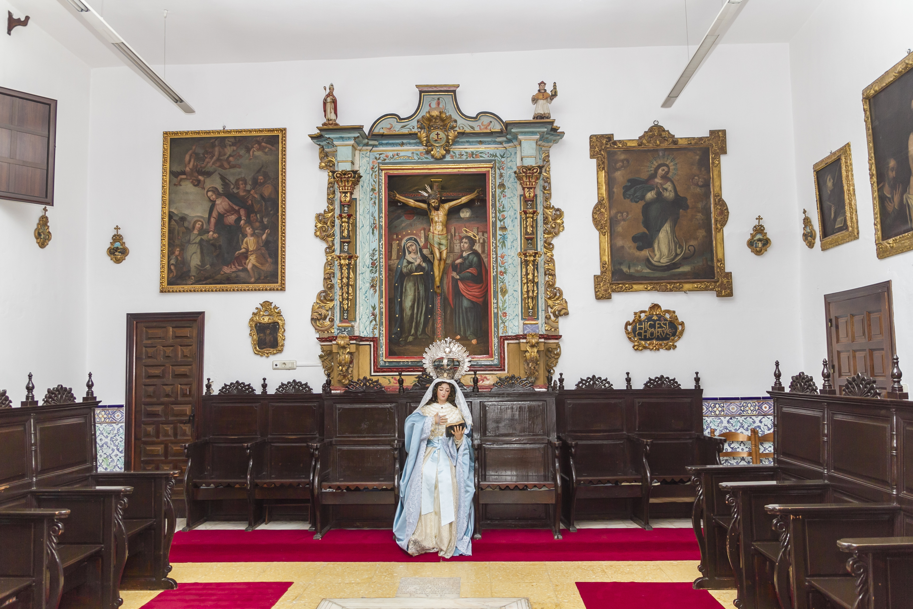 Coro del Real Convento de la encarnación donde destaca la Virgen sentada en él como madre abadesa de el Monasterio.